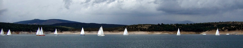 Actualmente, aparte de cumplir sus funciones de abastecimiento de agua y energía hidroeléctrica, el embalse es famoso también por la cantidad de deportes náuticos que en él se pueden practicar, ya que tiene permitida la navegación de embarcaciones sin motor.